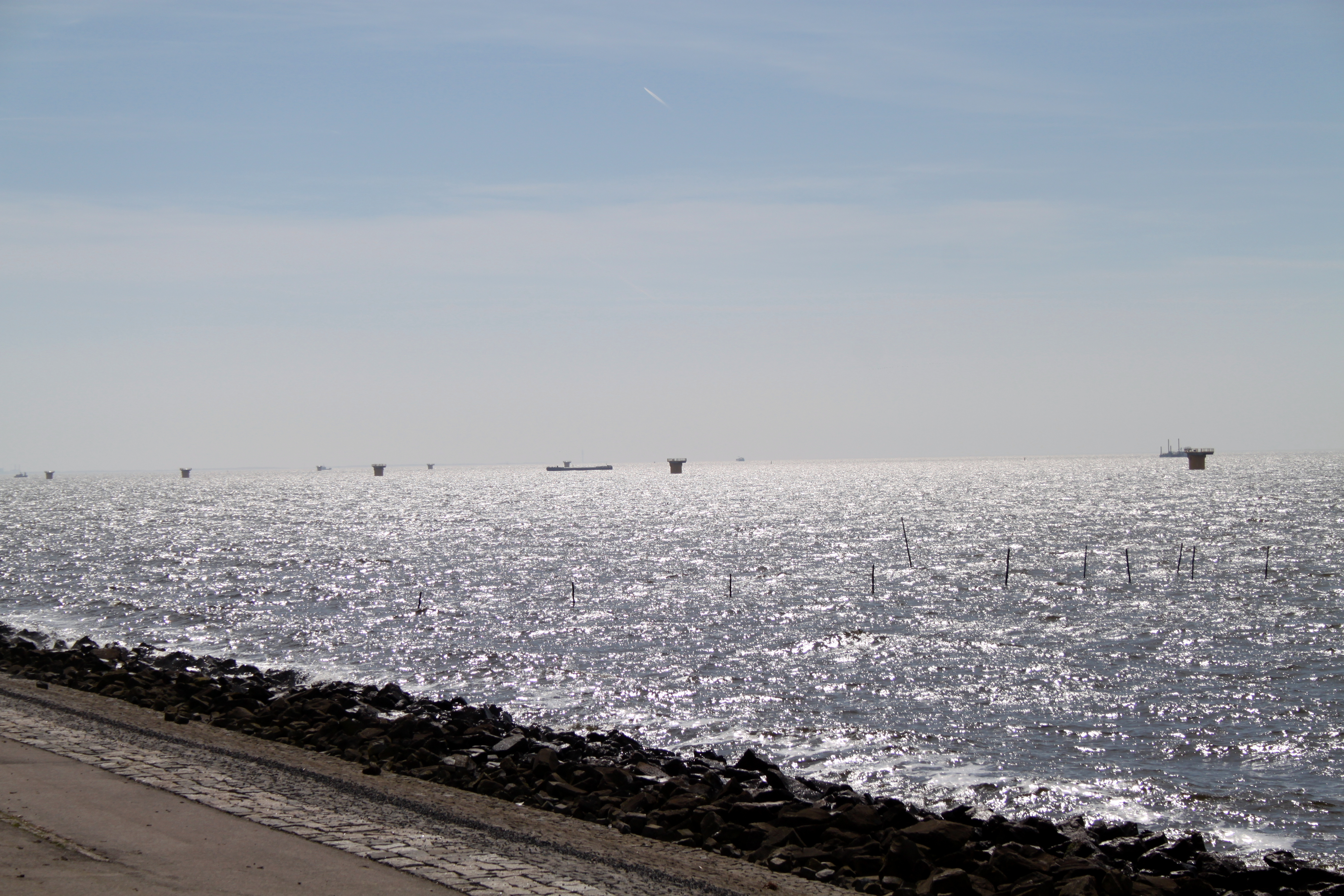 Noordoostpolder-windmolenpark Westermeerdijk 2015